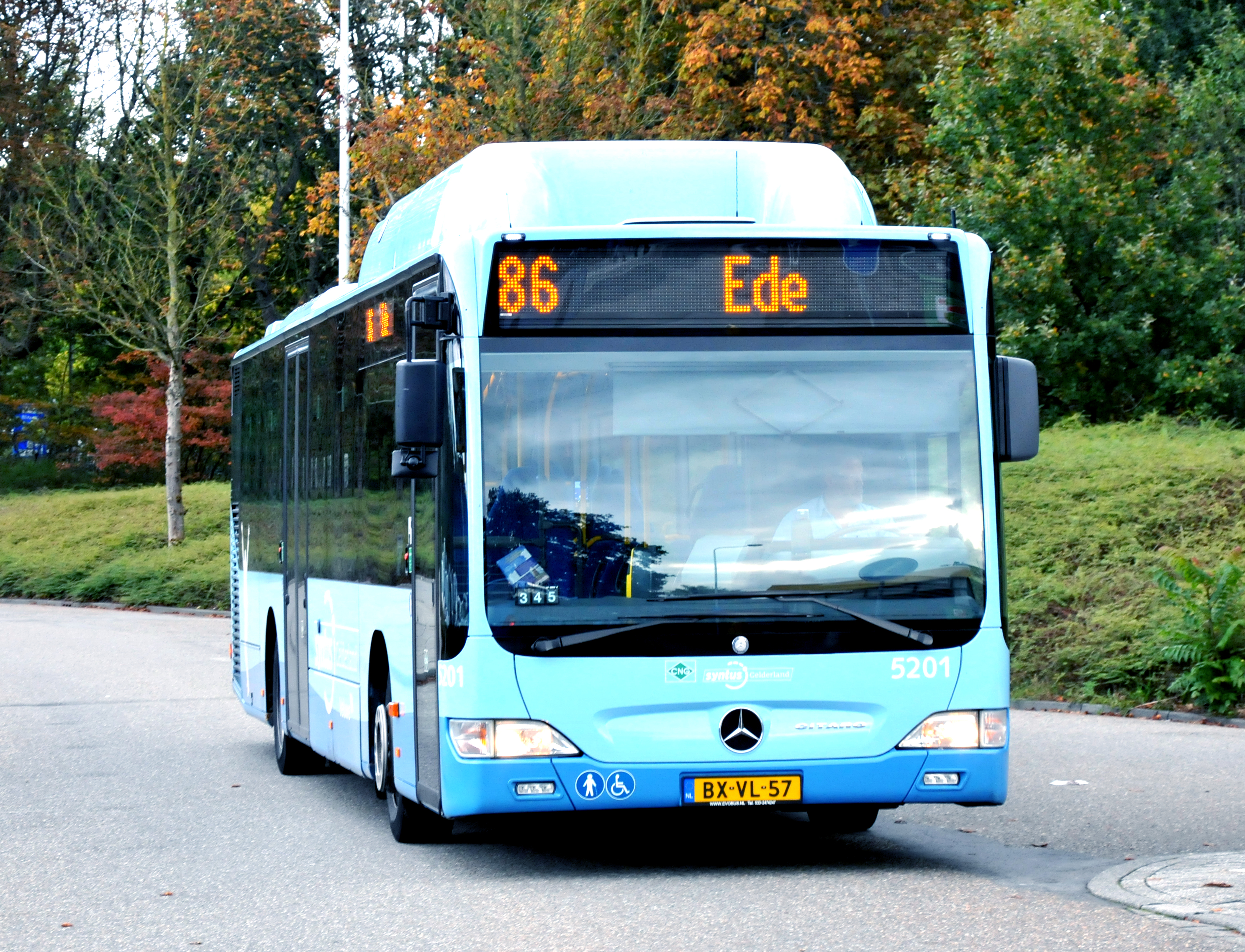 Syntus bus 5201 van het type Mercedes-Benz Citaro-CNG te Station Ede-Wageningen.